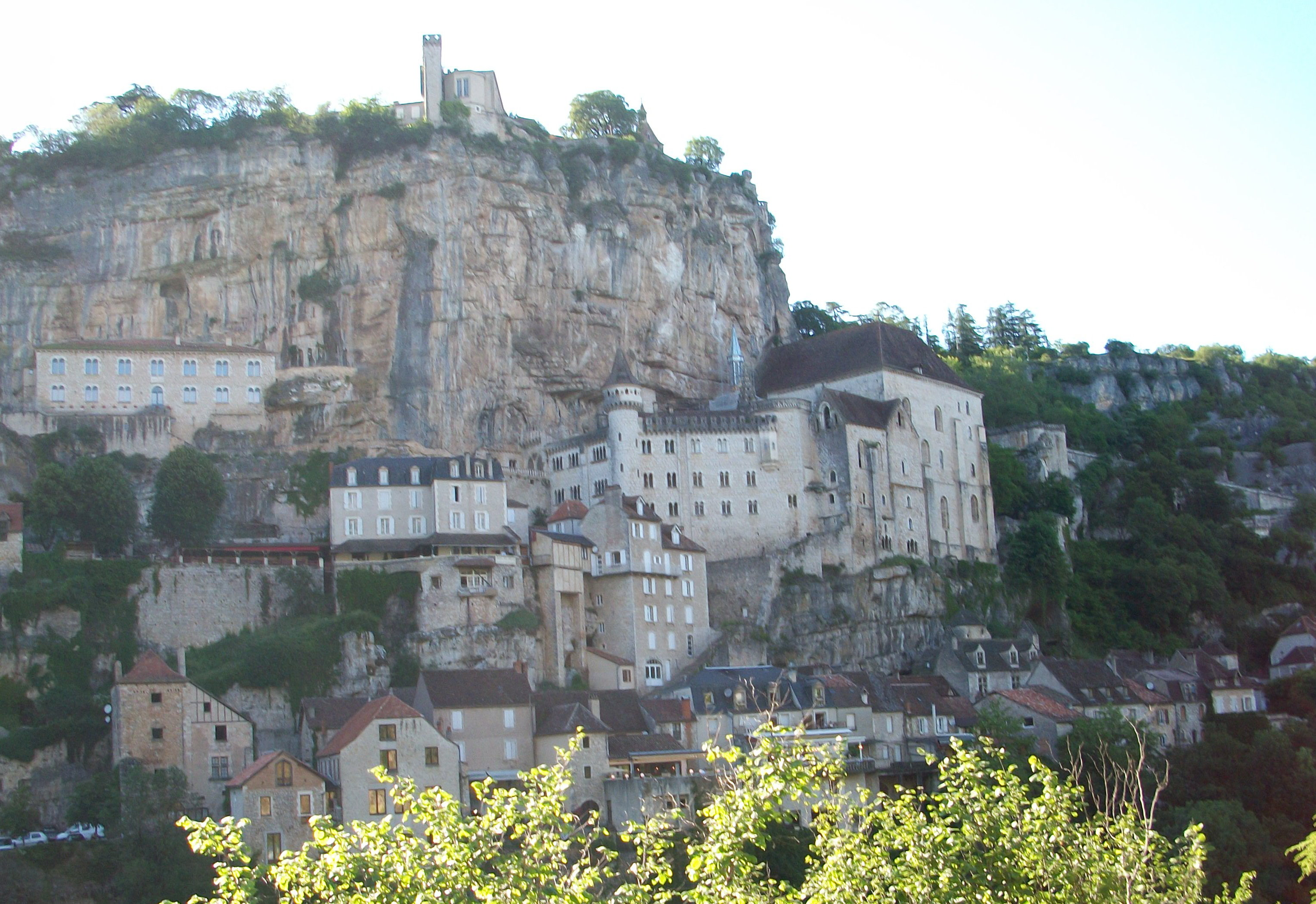 Ansicht von Rocamadour (Lot)